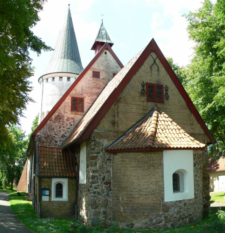 Süderstapel St. Katharinen